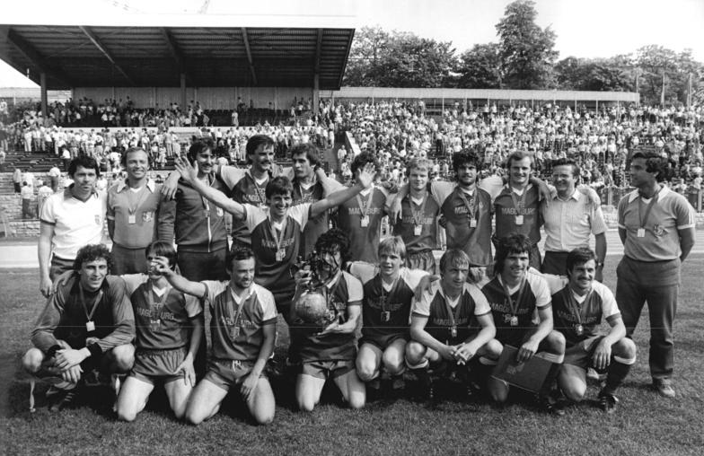 ADN-ZB-Mittelstädt-4.6.83-zin-Berlin: 32. Endspiel um den FDGB-Pokal im Fußball 1. FC Magdeburg - FC Karl-Marx-Stadt 4:0 (2:0). Die überglücklichen Spieler, Trainer und Funktionäre stellten sich nach der Pokalübergabe zum traditionellen Mannschaftsfoto. Vor 50 000 Zuschauerm im ausverkauften Verliner Stadion der Weltjugend setzten sich die Elbestädter klar gegen Außenseiter FC Karl-marx-Stadt durch und errangen in ihrem siebenten Pokal-Finale den siebenten Erfolg